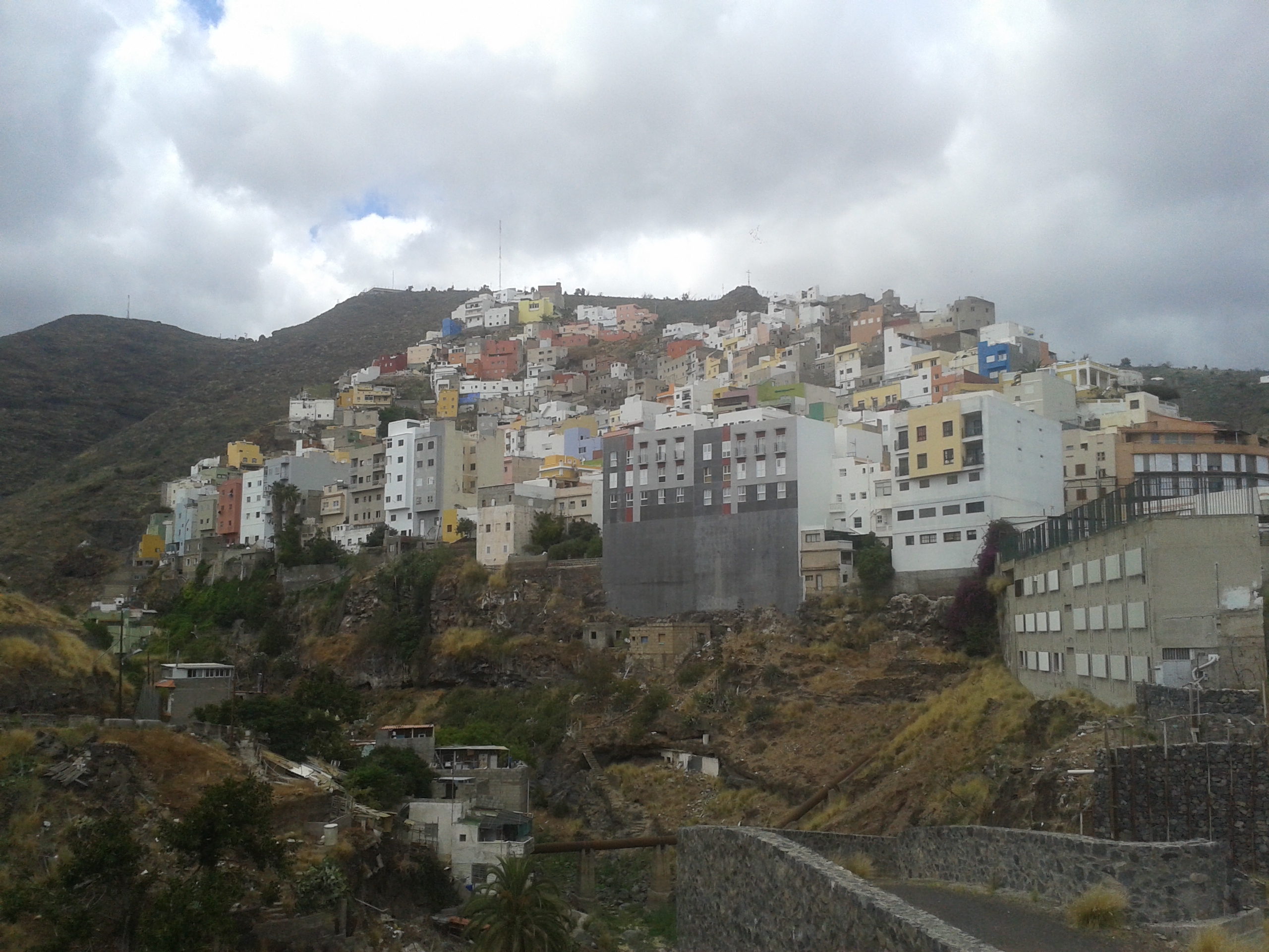 Vista del Barrio Nuevo desde el puente Javier del Loño